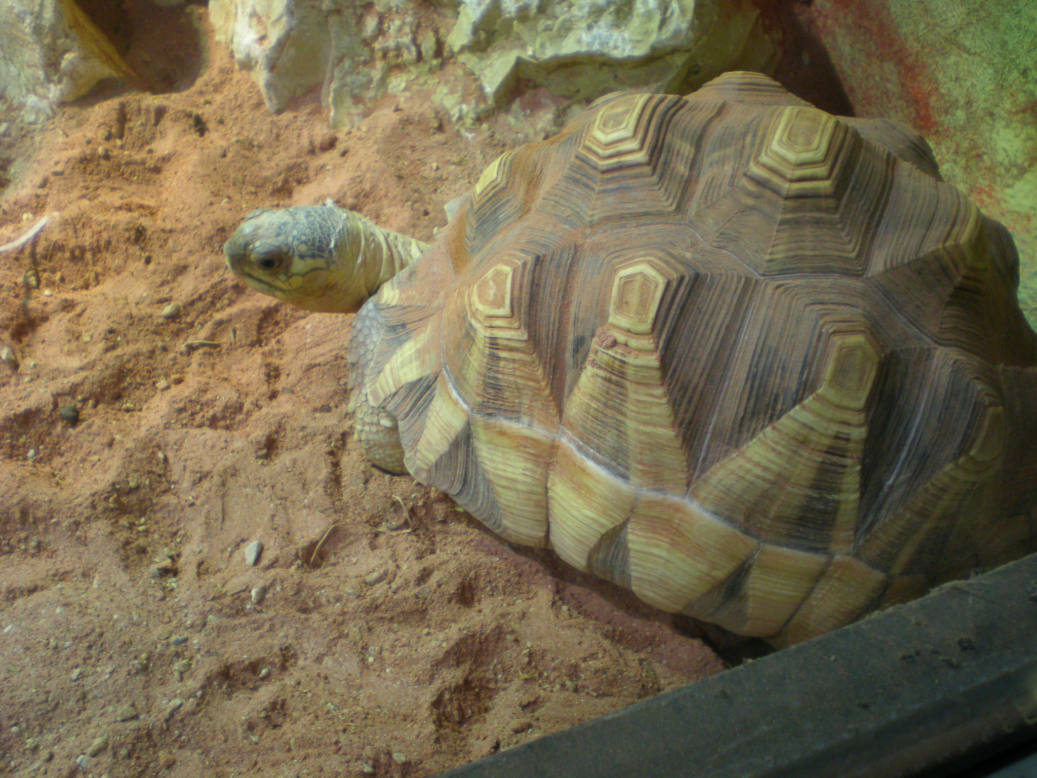 Tortue sans le Mersus emergo du Pairi Daiza (Cambron-Casteau, Belgique)